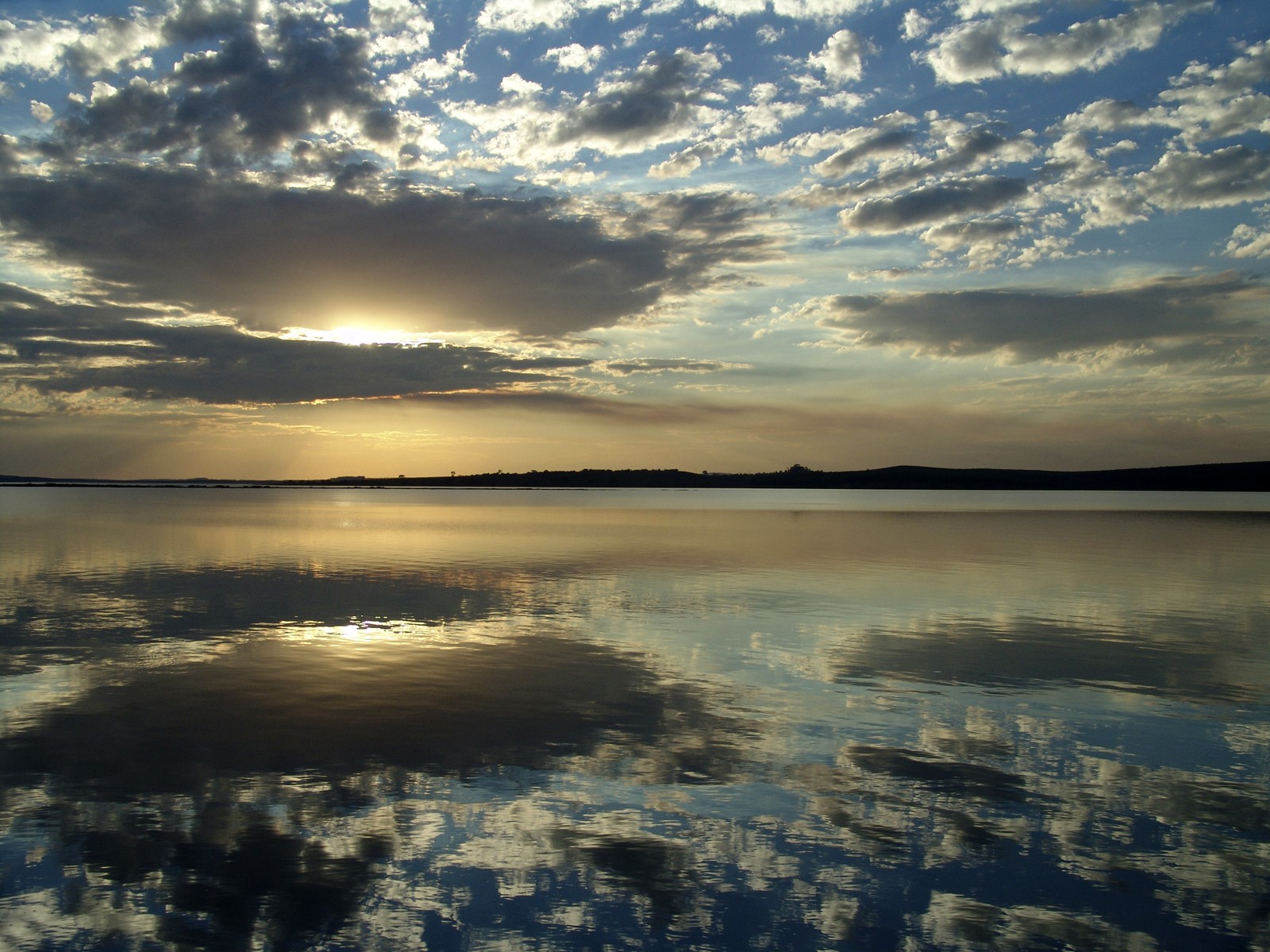 rio Paranapanema no município de Paranapanema, São Paulo, Brasil